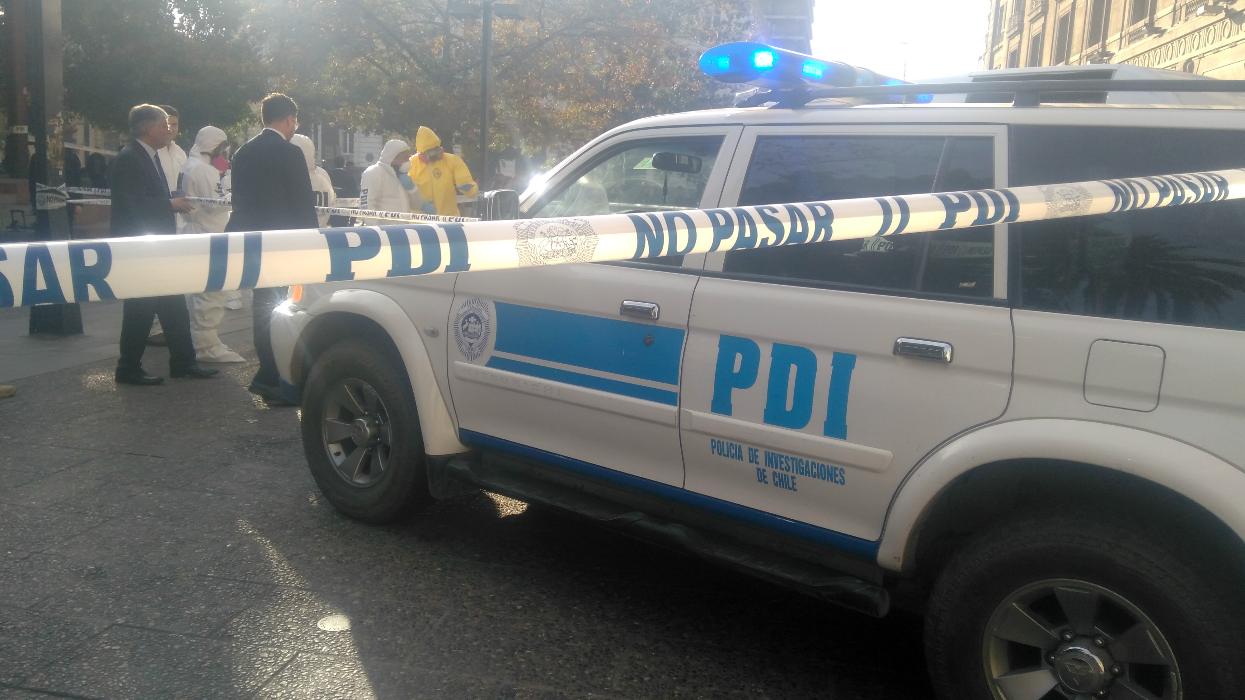 Exhibición del trabajo de la Policía de Investigaciones (PDI) en la Plaza de Armas de Santiago de Chile (2017).